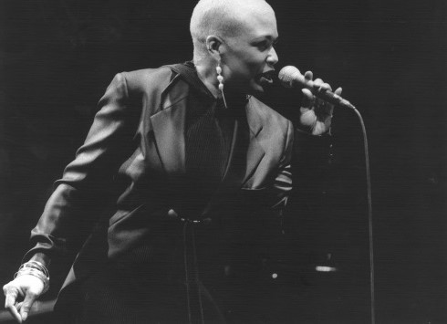 Dee Dee Bridgewater - Edition 1996